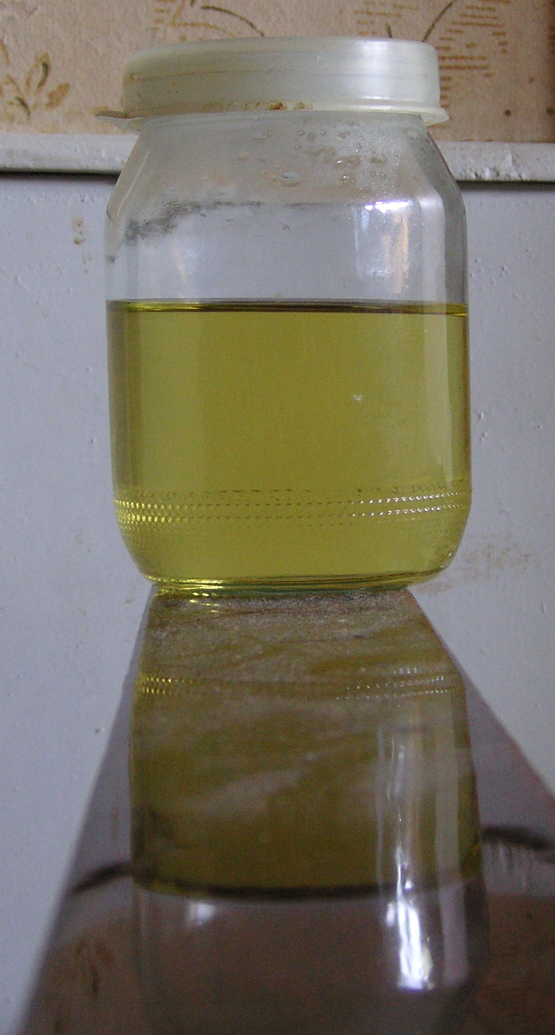 Баночка с мочой. на фотографии запечатлена майонезная банка, полная мочою чуть более, чем наполовину.